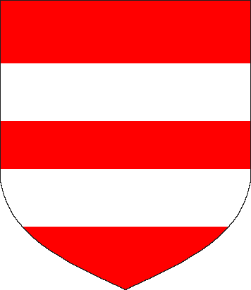 Wappen derer von Beichlingen